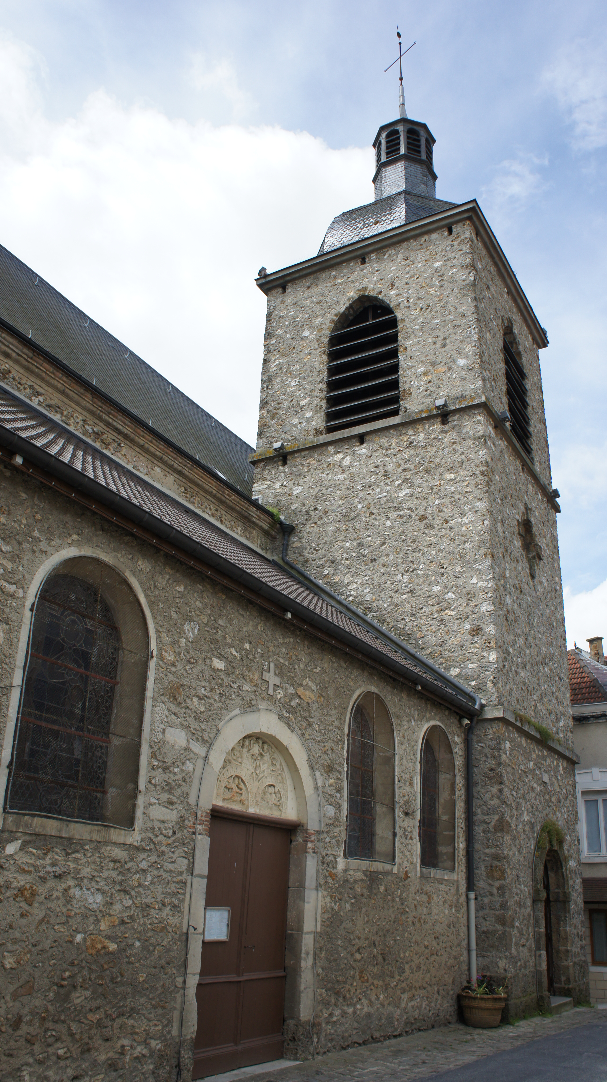 Vue de l'église à Cumières .